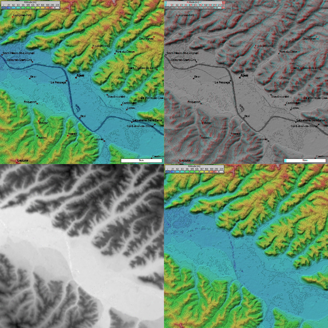 Topographie d'Agen 4 images topographique (20 km de coté) d'Agen prisent par la mission SRTM. Image topographique + position des villes image topographique en relief + position des villes image topographique en niveau de gris (utile pour displacement map dans les logiciel 3D) Image topographique sans les villes Générée par le logiciel Radiomobile à partir des données domaine public de la mission SRTM de la NASA.